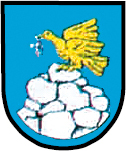 Herb Zawady (gmina Zbrosławice, powiat tarnogórski, województwo śląskie, Polska)